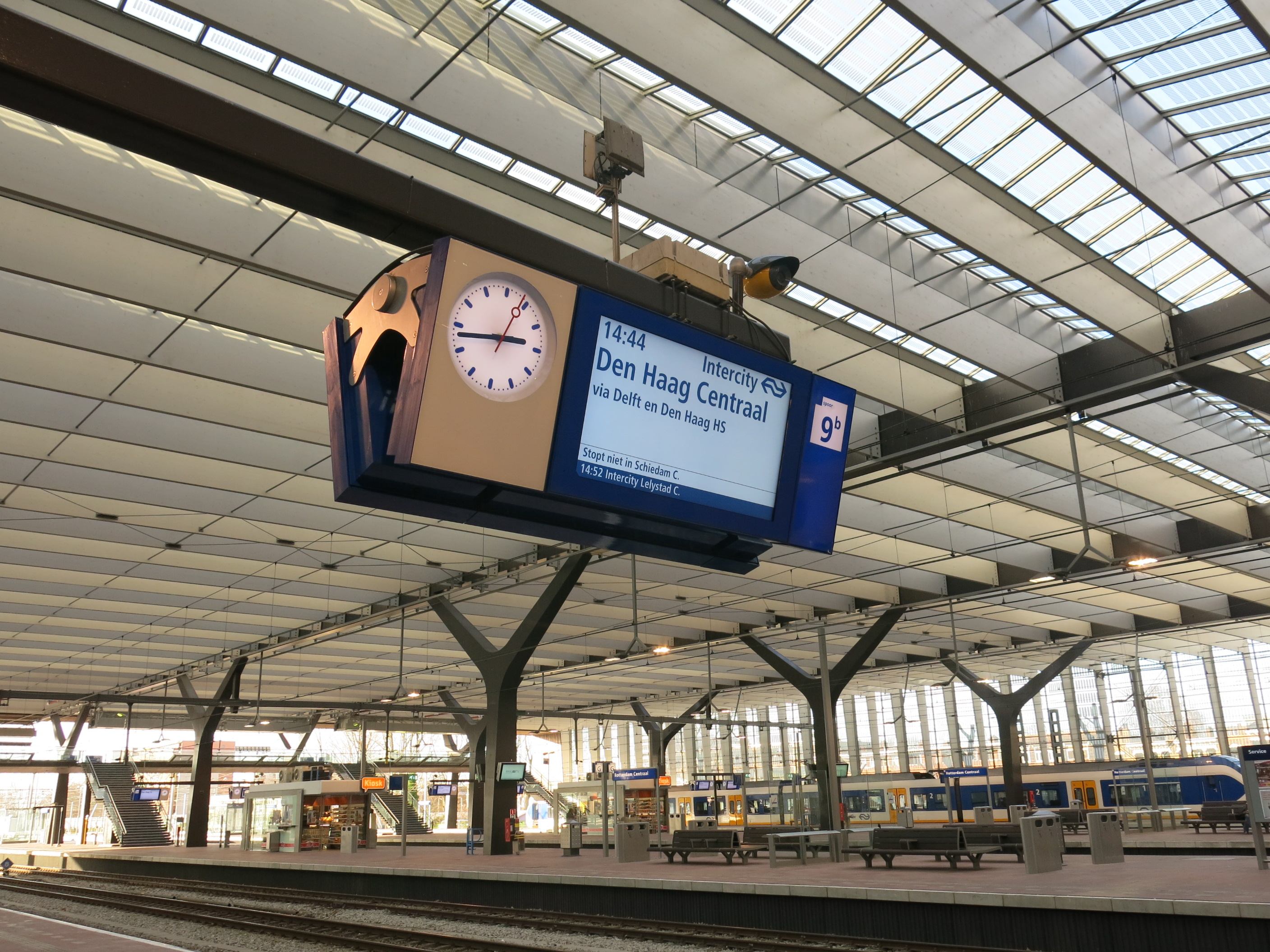 Treinbeeldperron met klok op Rotterdam Centraal.